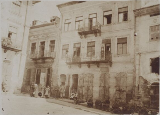 Майдан Волі, до 1914, Бучач